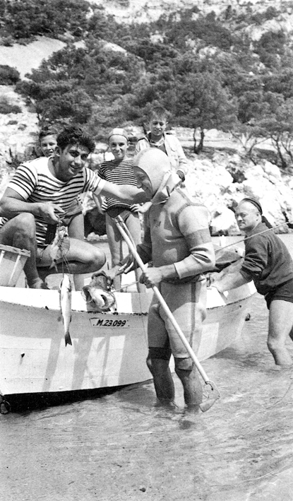 Création de la première combinaison isothermique au monde en 1953